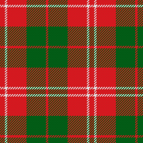 R/8 W4 R32 G32 R/4